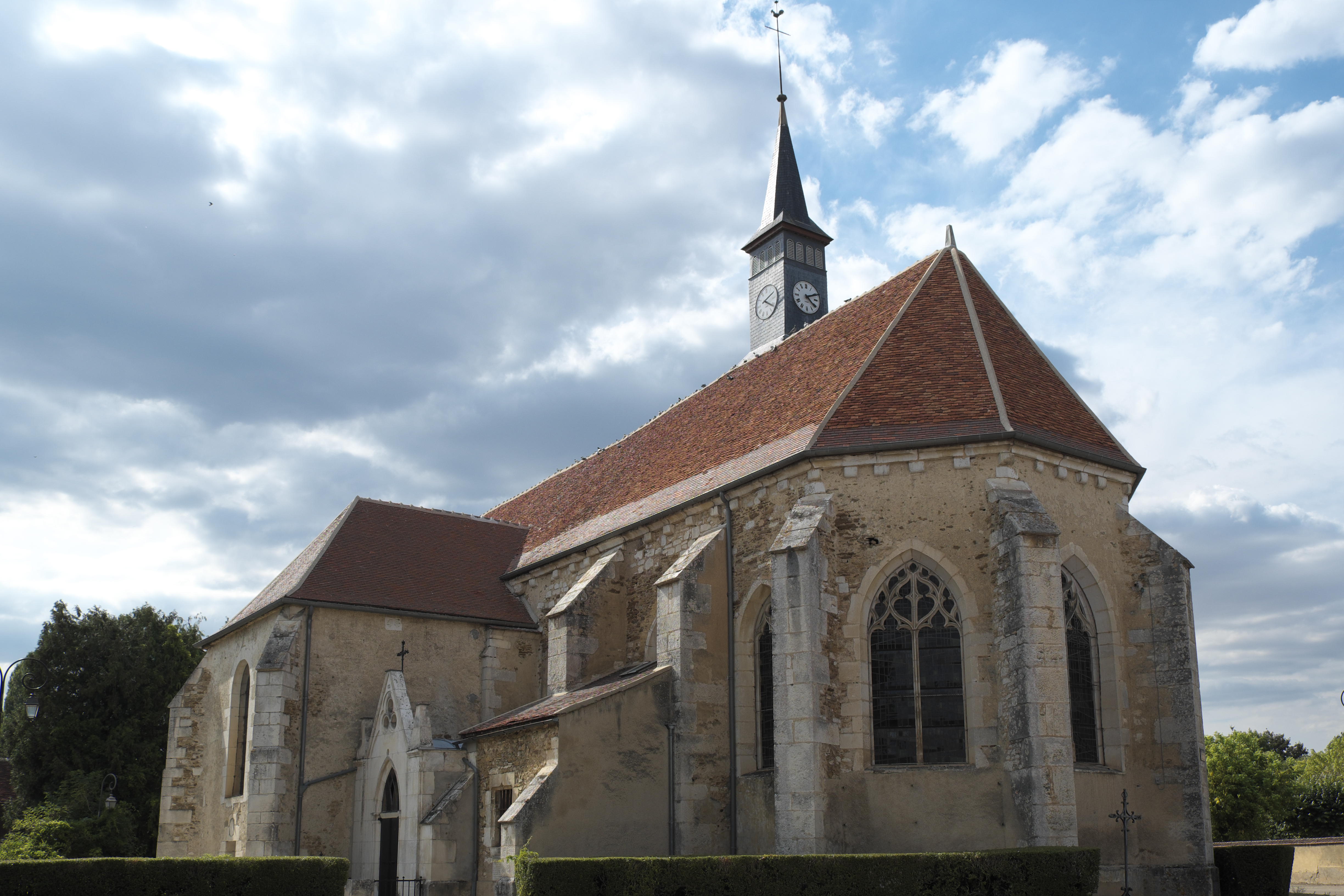 Kirche Saint-Léger in Flogny-la-Chapelle im Département Yonne (Burgund/Frankreich)